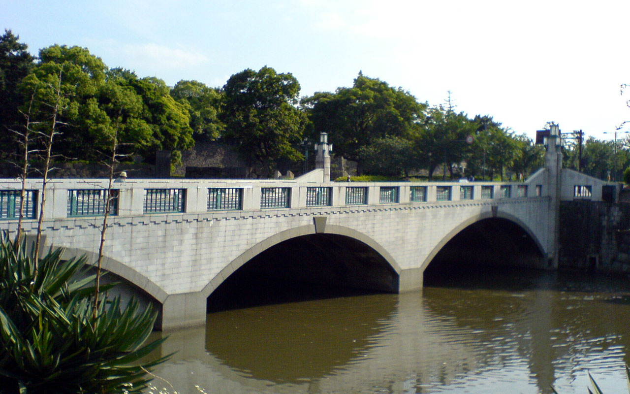 竹橋 （内堀）